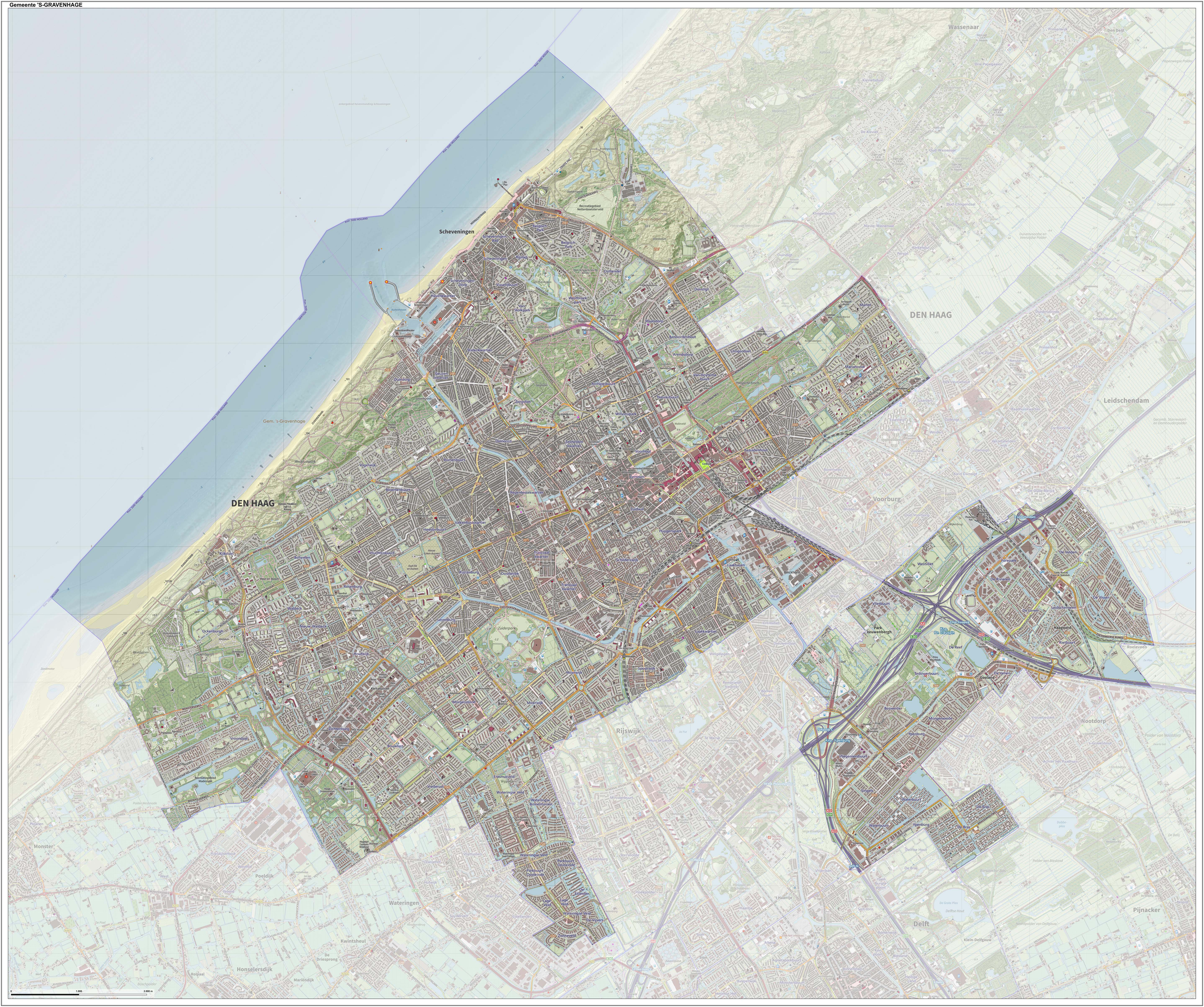 Topografische gemeentekaart. Resolutie: 400 pixels/km. Kaartbeeld samengesteld uit de open geodata van de Top10NL en Top25namen (Kadaster), Creative Commons-BY licentie. Gebouwvlakken uit open geodata BAG extract. Wegen uit de OpenStreetMap, OpenStreetMap community. Reliëfschaduw uit de Actuele Hoogtekaart AHN2. Samenstelling en kleurenschema: Jan-Willem van Aalst, met QGIS. Zie ook de Legenda.